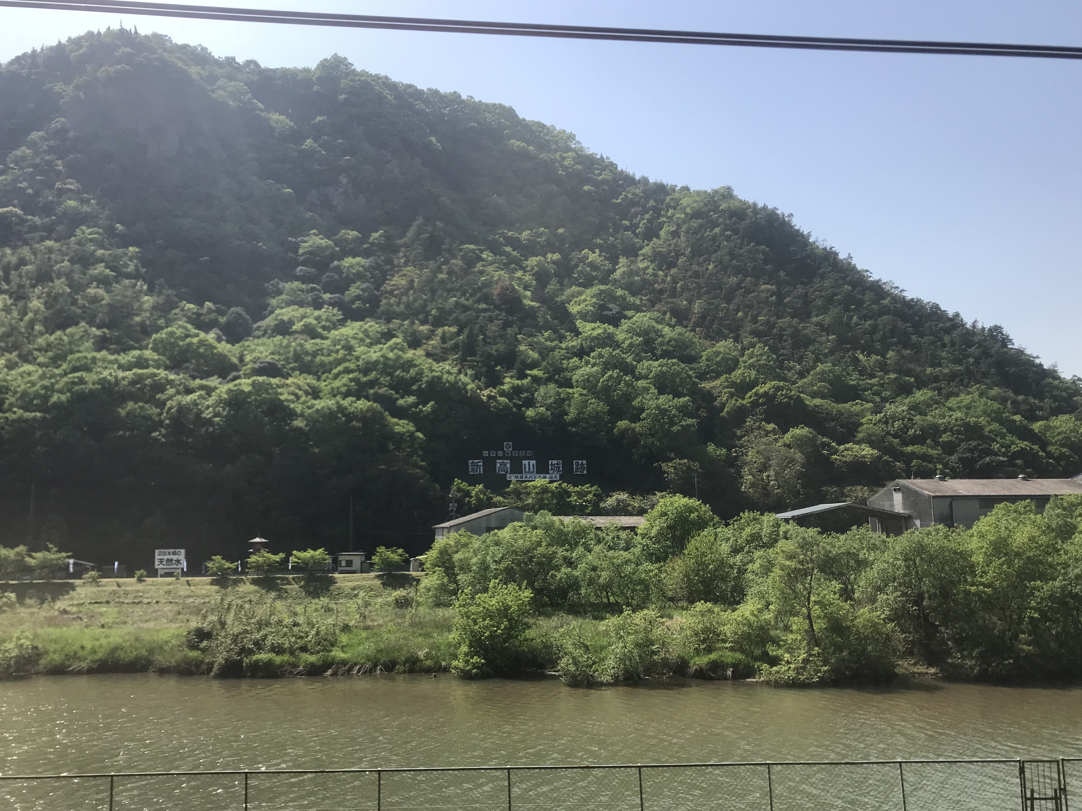 山陽本線の列車内より望む新高山城跡と沼田川